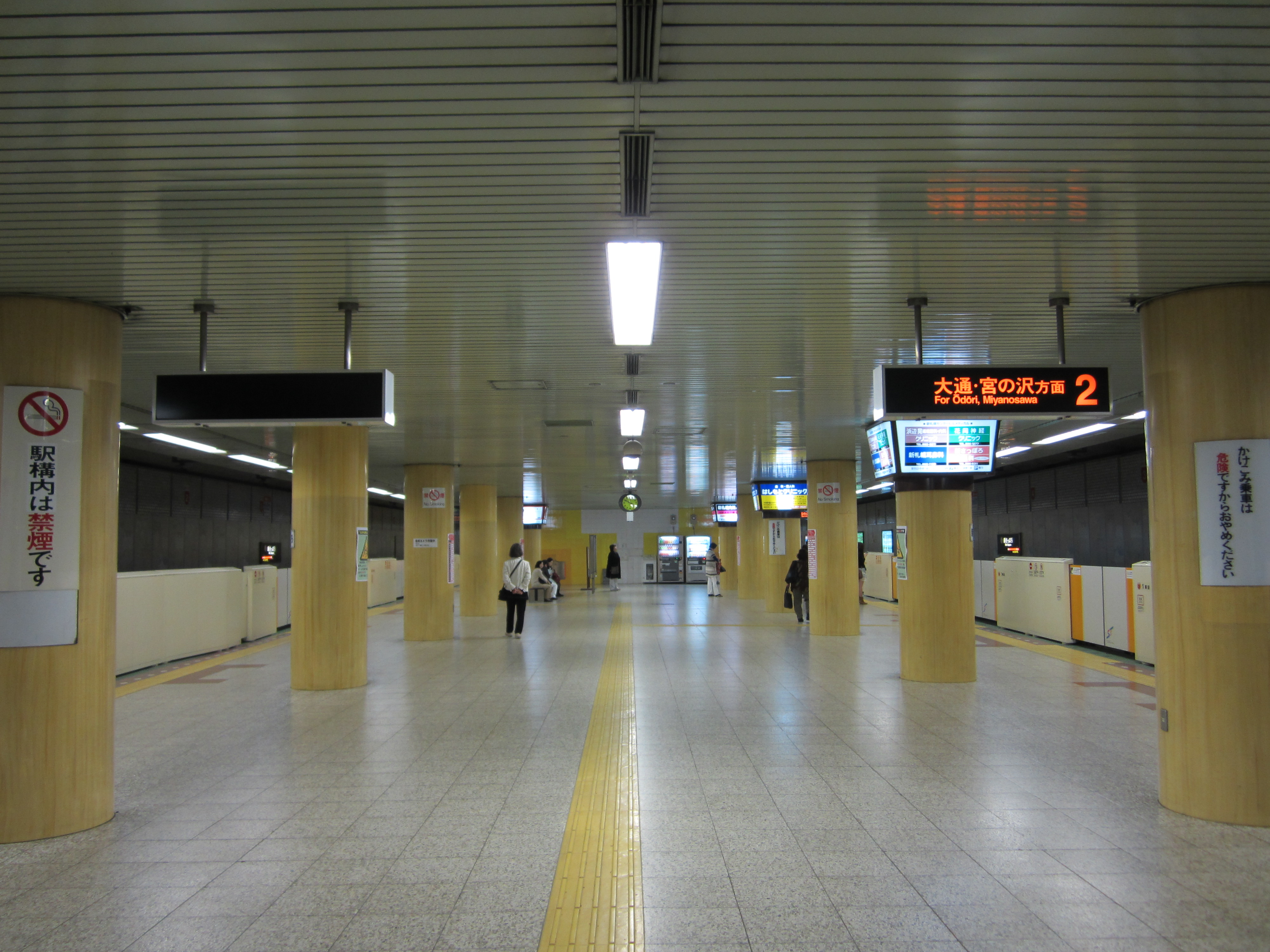 札幌市営地下鉄東西線新さっぽろ駅ホーム